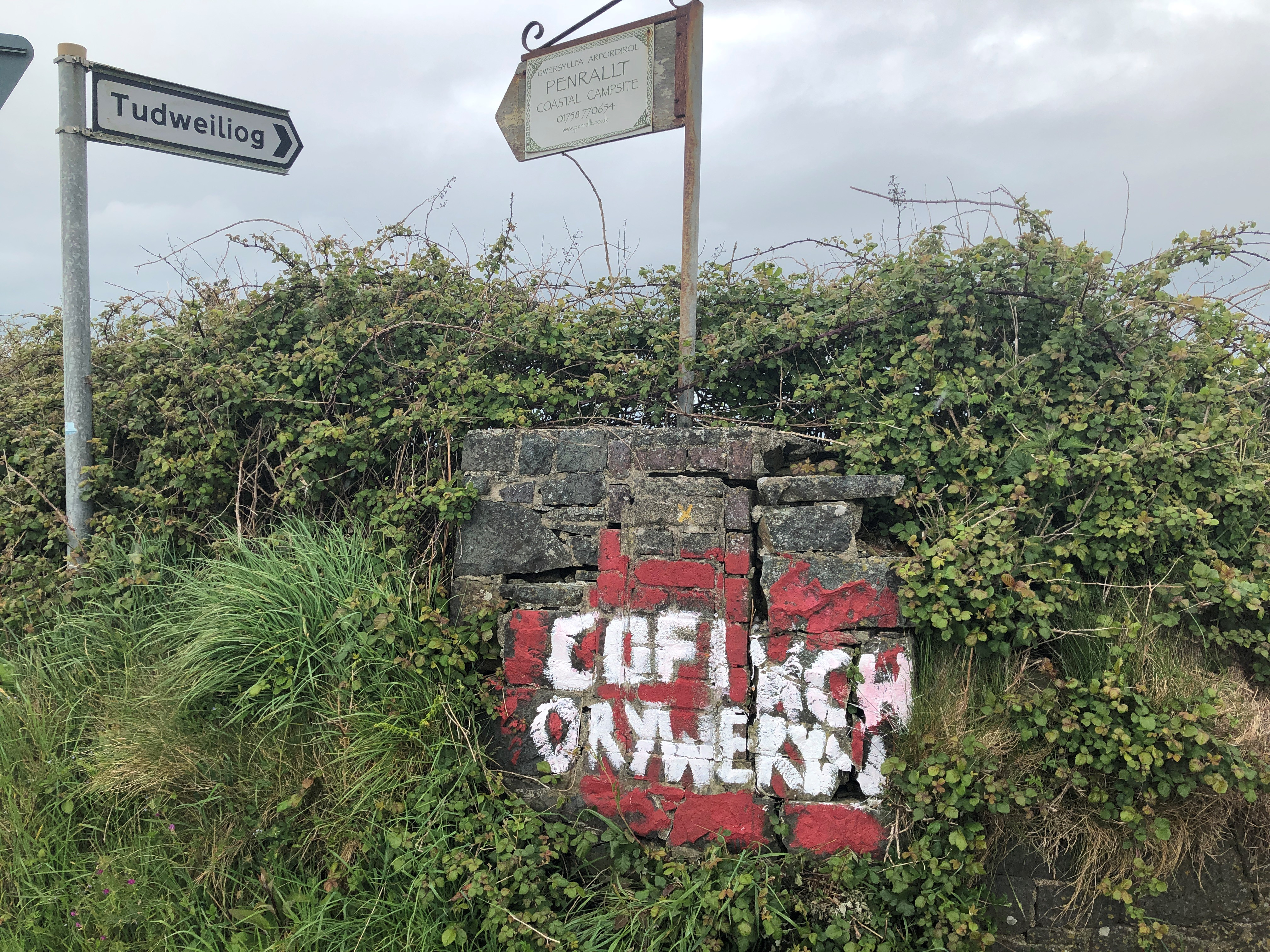 'Cofiwch Dryweryn' Tudweiliog, 2019